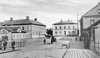 Rådhuset, Eskilstuna